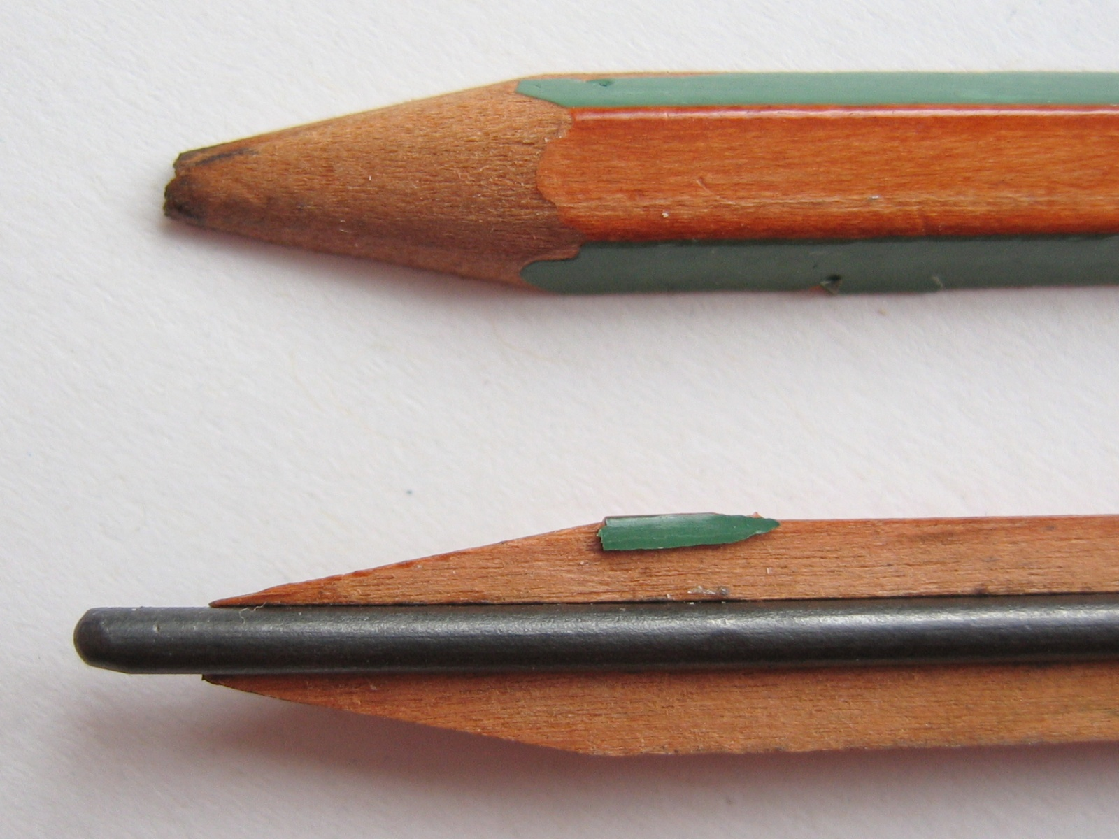 Halbierter Bleistift